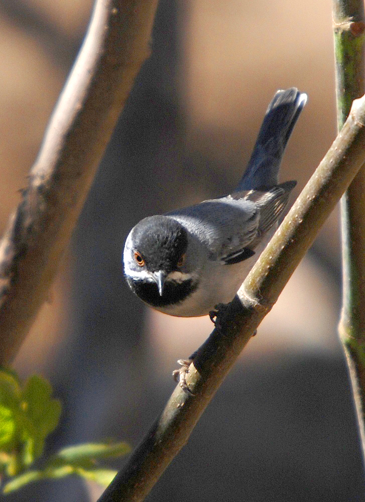 Kurdî: Navê kurdî nehatiye tespît kirin.